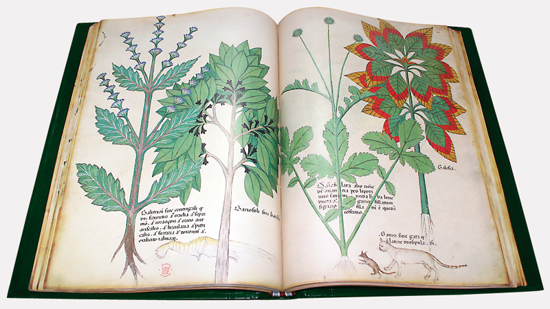 Herbario renacentista